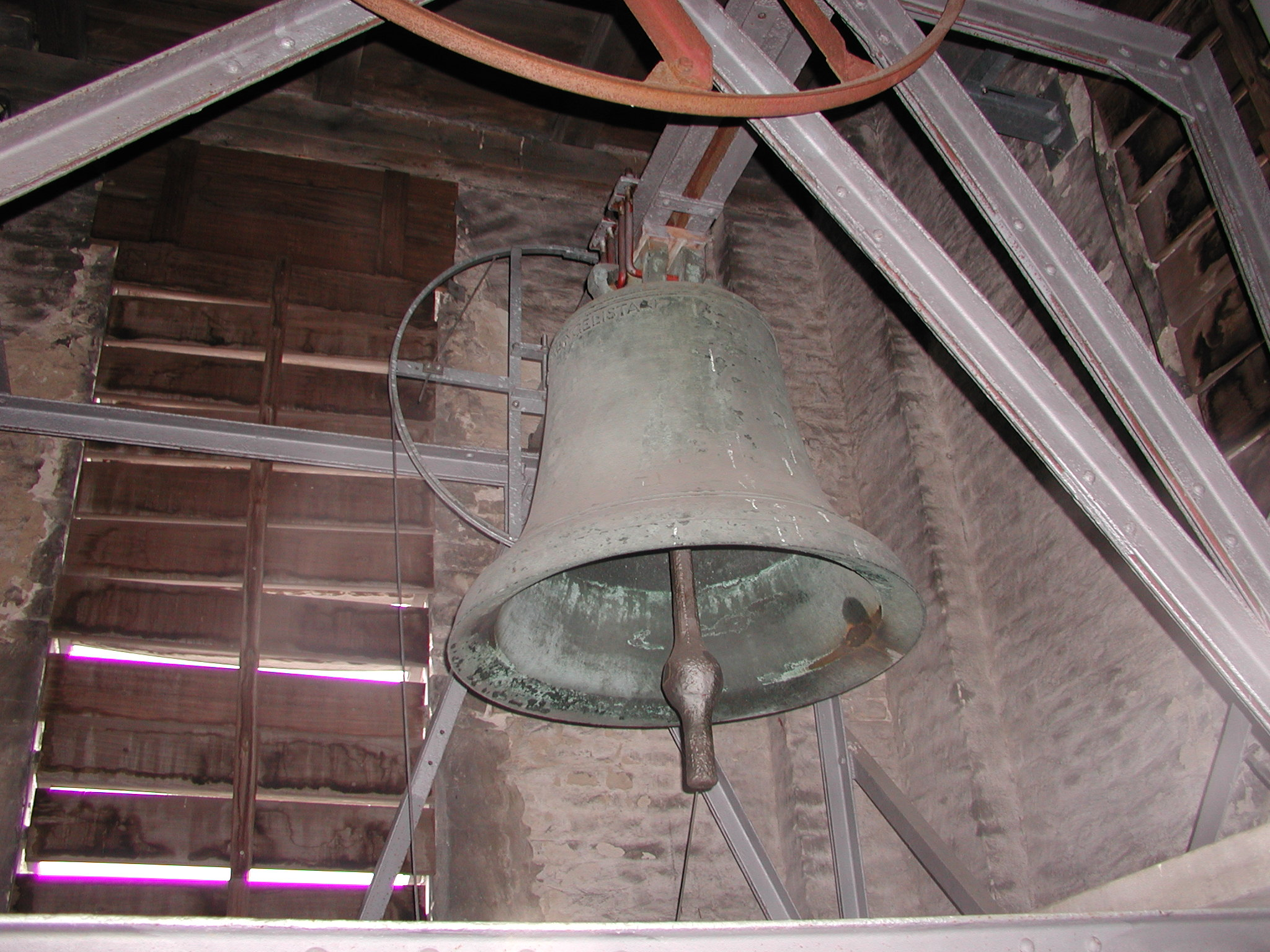 St. Marienkirche in Berlin-Karlshorst